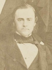 Depicted person: Svante Hedin, Skådespelare, Sverige (1822-1896)